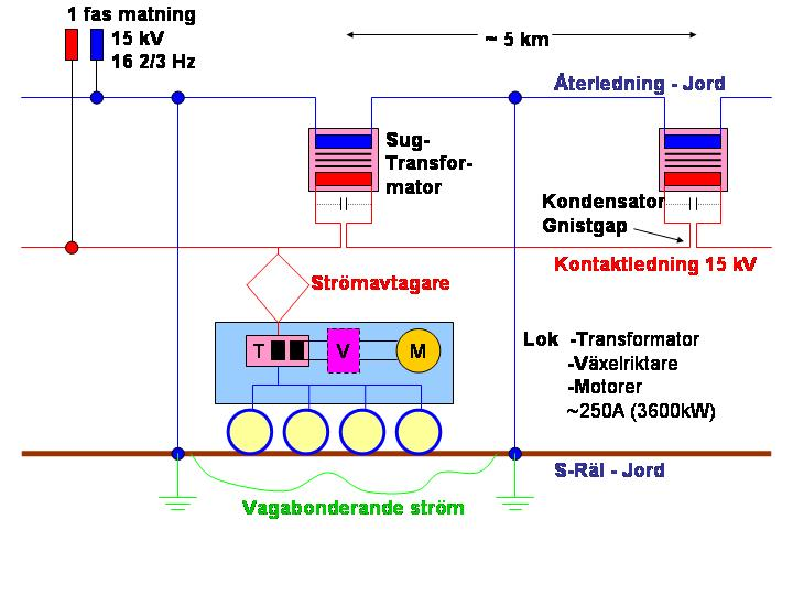 Sugtransformatorsystem (BT)